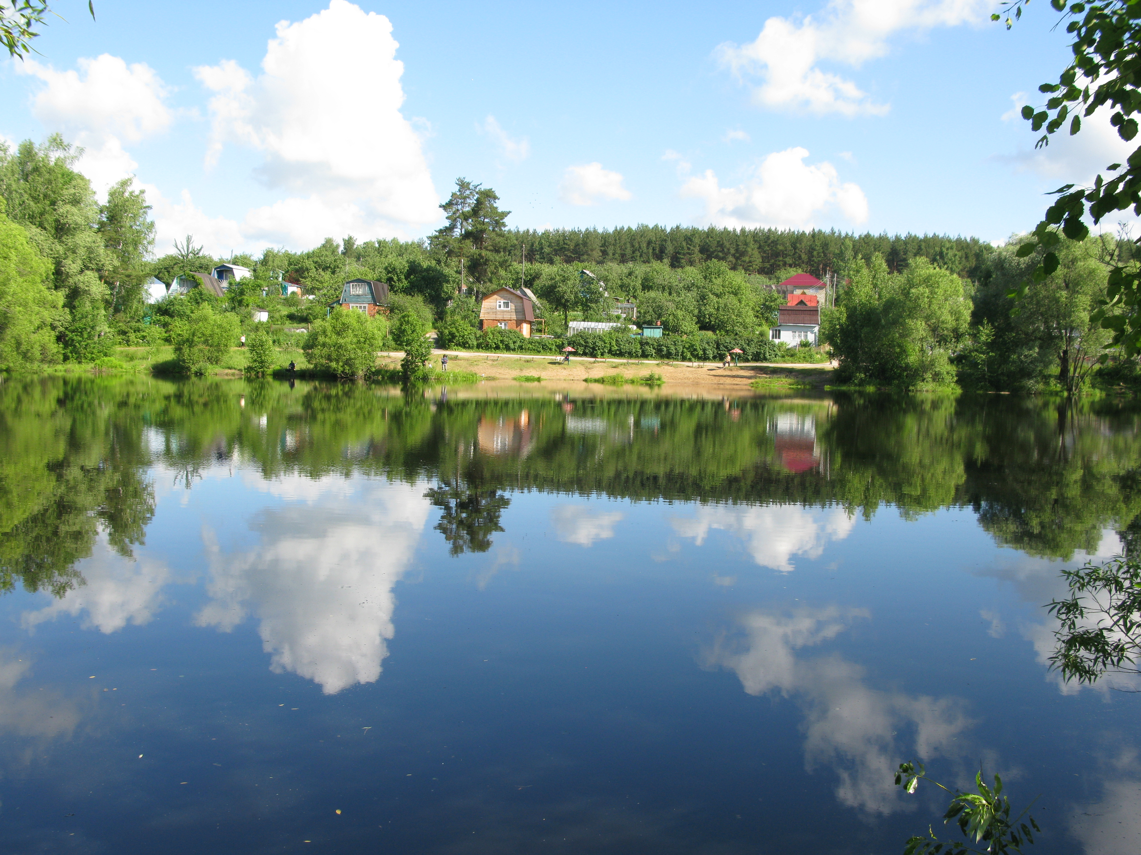 Владимир.Радужное